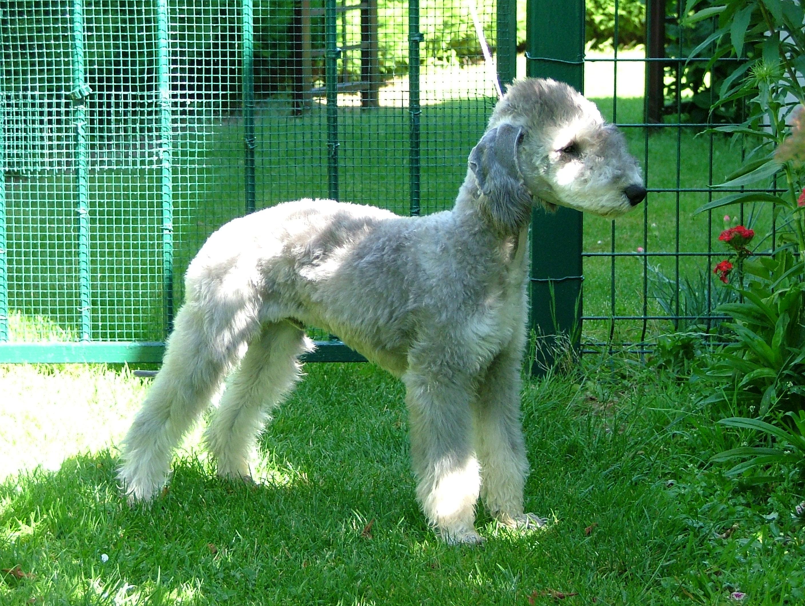 Diego à quatre mois, un petit mâle Bedlington Terrier en juin 2009.